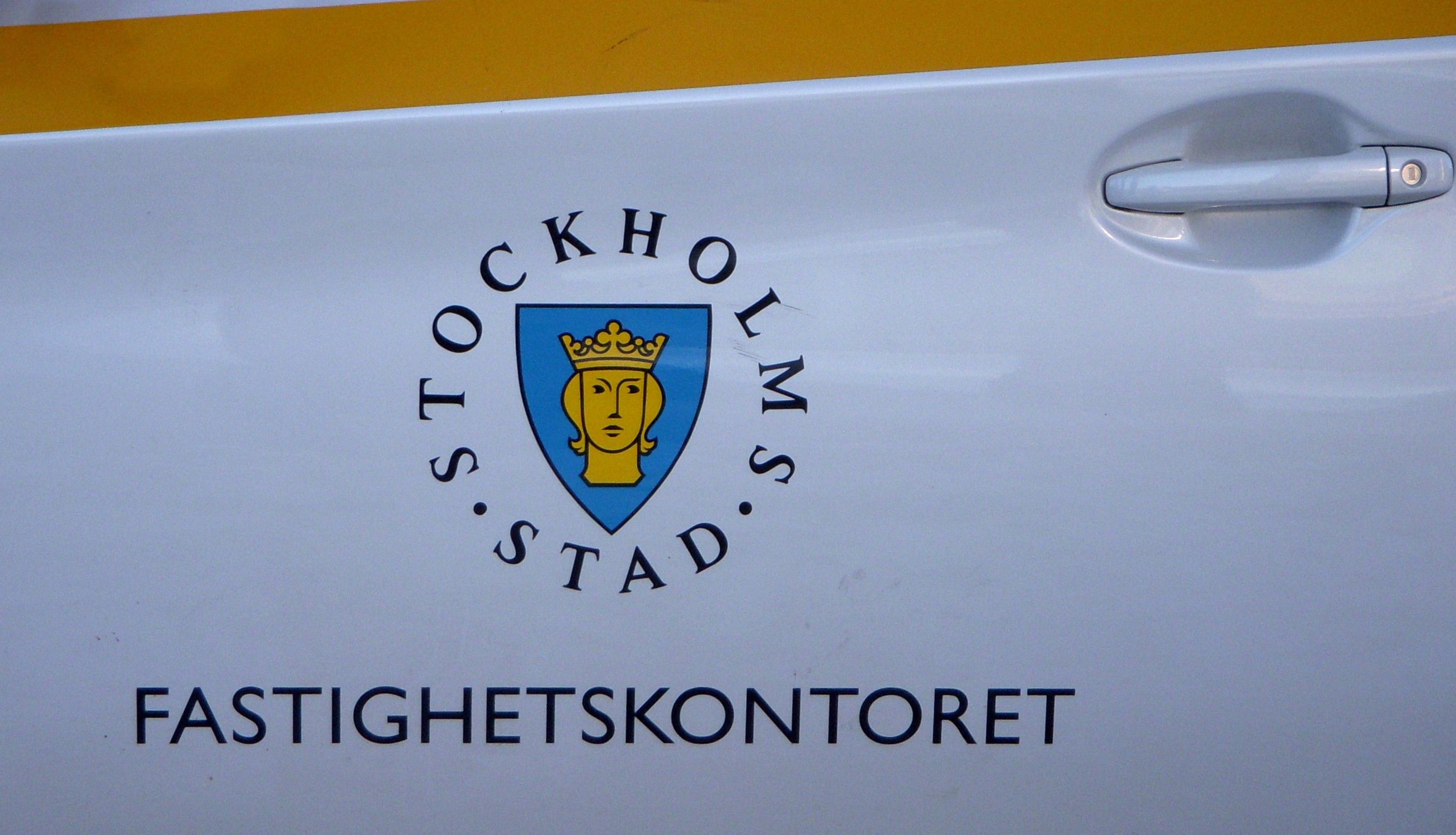 Logo Stockholms stads fastighetskontor på en av dera bilar